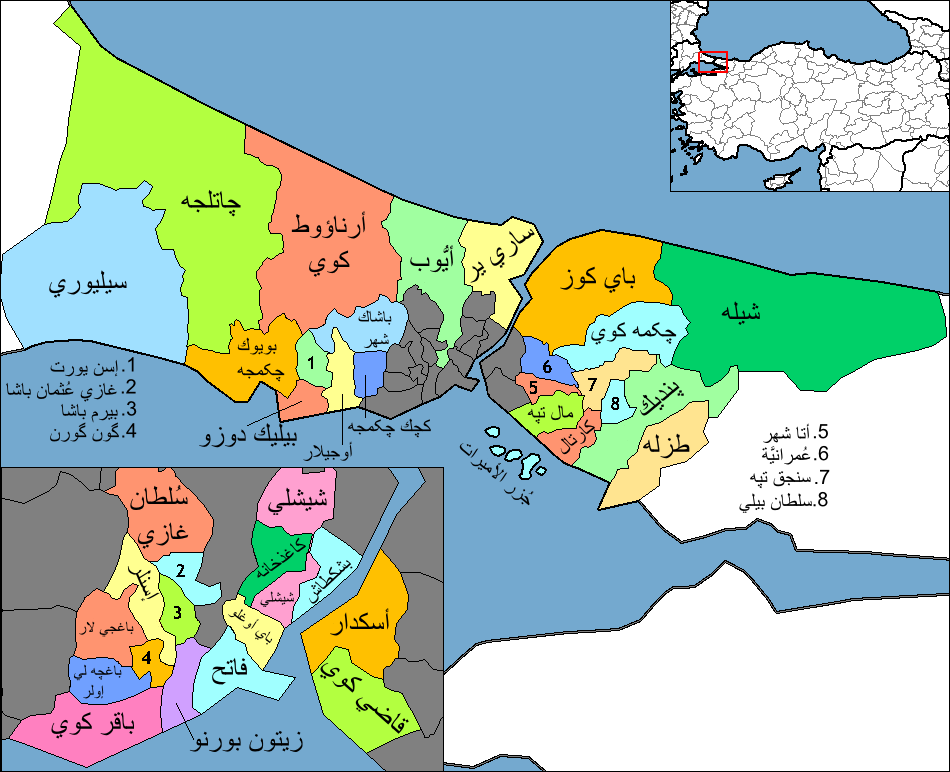 خارطة تُظهر التقسيم الإداري لِمدينة إسطنبول، أي نواحيها ومناطقها.